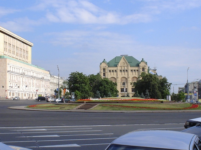 Lubyanka Square